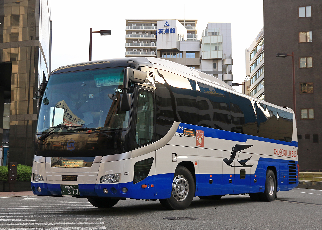 登録番号 島根200か･573 中国ジェイアールバス㈱島根支店所属 夜行高速路線用車両 2015年9月19日 福岡市中央区にて撮影 撮影者 Zondag2000